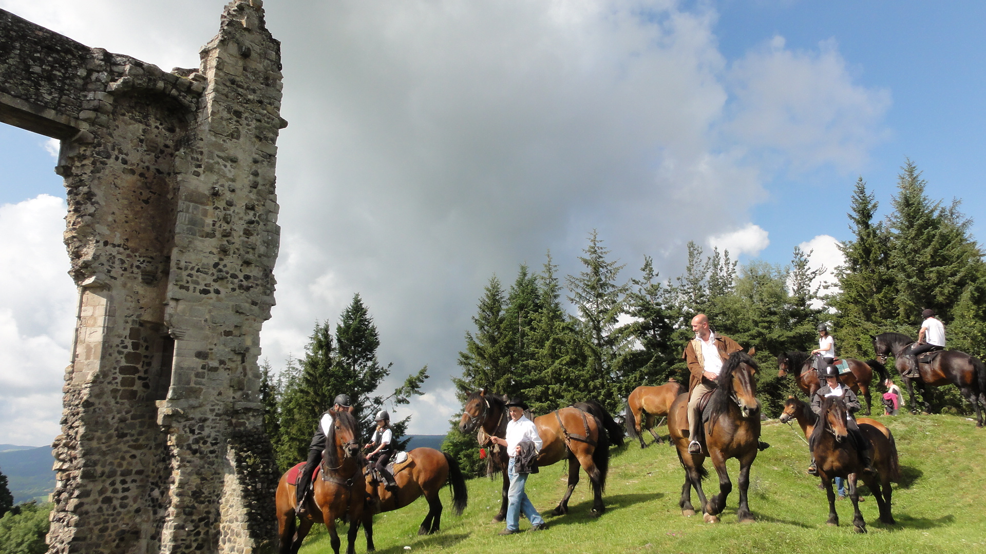 Concours Allègre 2014